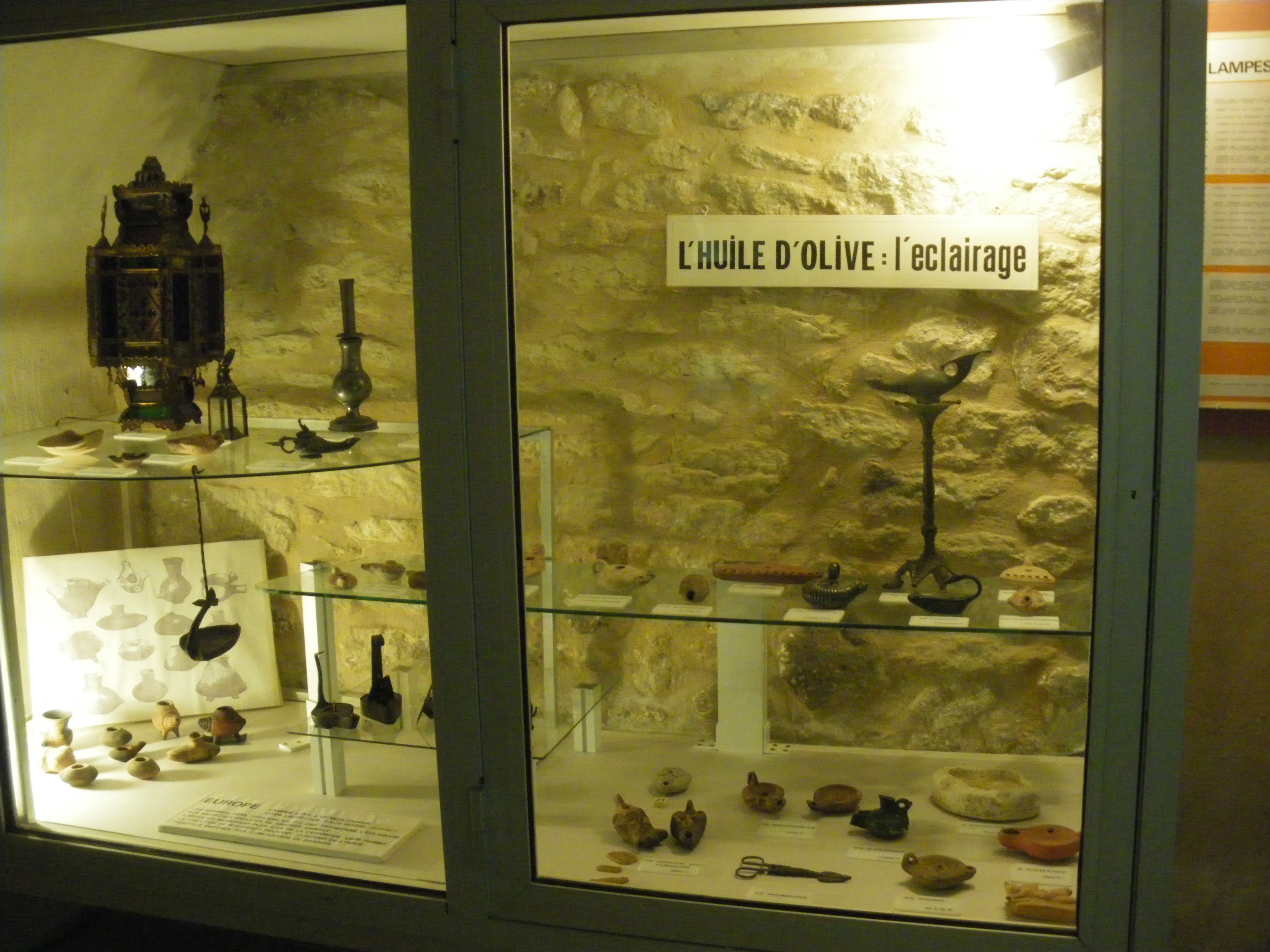 Lampes à huiles du Musée du Moulin des Bouillons, Gordes (84)